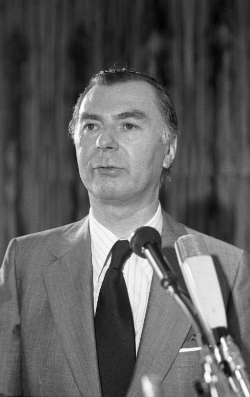 Bundesausschuß-Sitzung der CDU im Konrad-Adenauer-Haus, Bonn (Leo Tindemans - belgischer Premierminister)